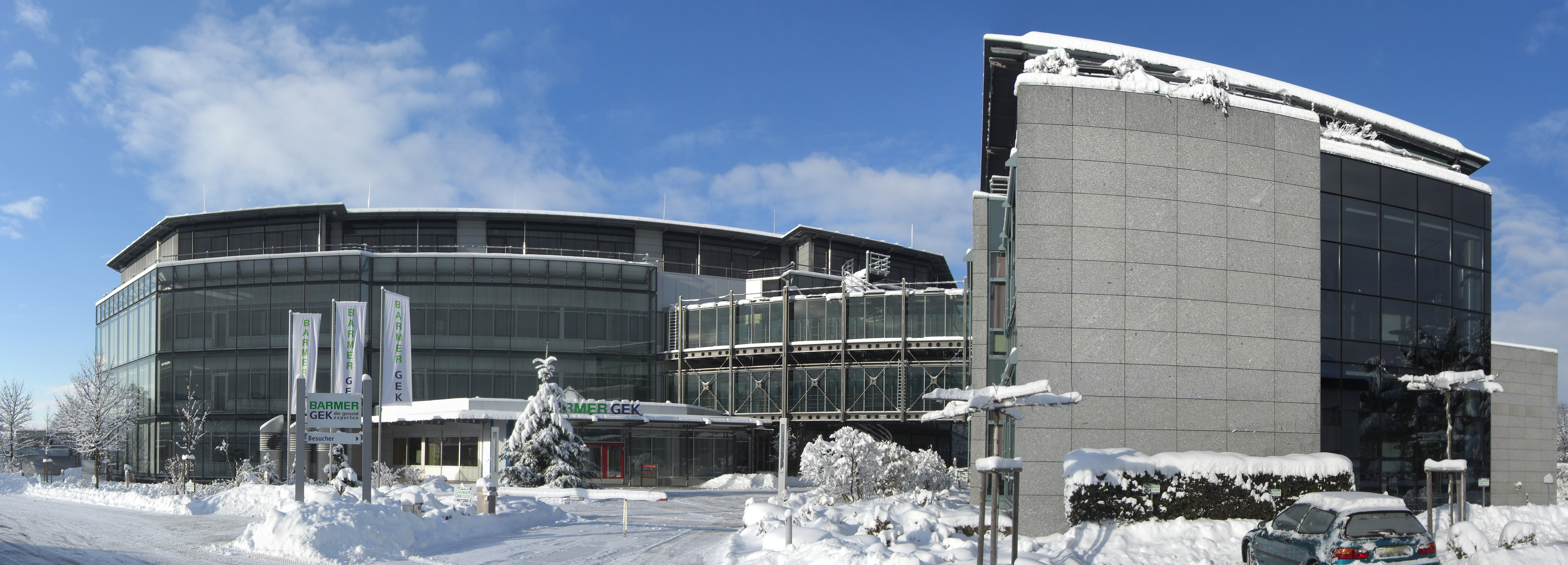 Die Hauptverwaltung der BARMER GEK Standort Schwäbisch Gmünd